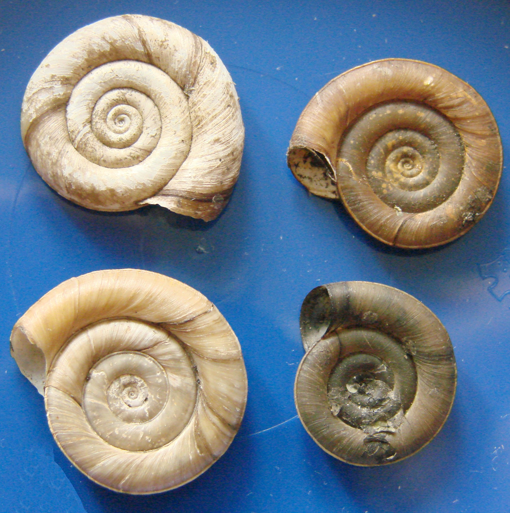 Planorbis planorbis